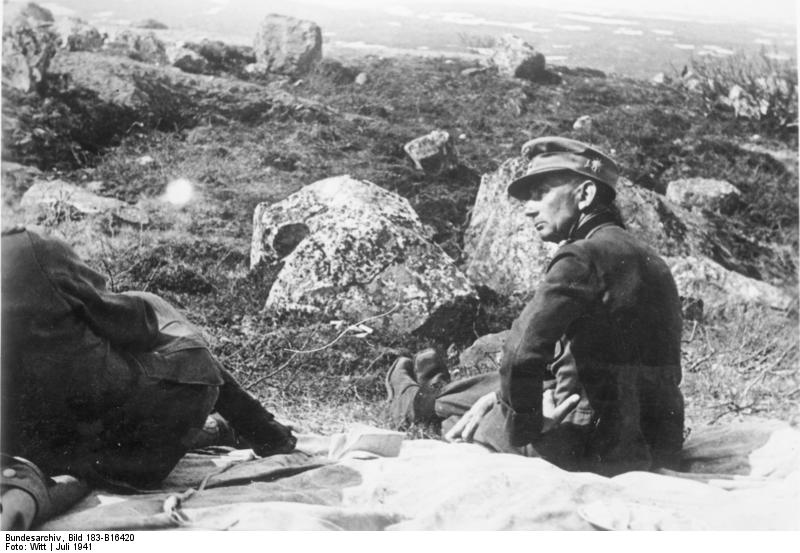 An der Sowjetfront: Bei einem Divisionsstab im Gelände der nordsowjetischen Tundra. General Dietl im Gespräch mit einem General. PK-Aufnahme: Kriegsberichter Witt 852-42 "Fr" "Fr.OKW" Juli 1941